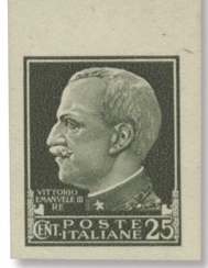 Britische PWE-Fälschung der italienischen "König Emanuel III"-Marke, 1943.